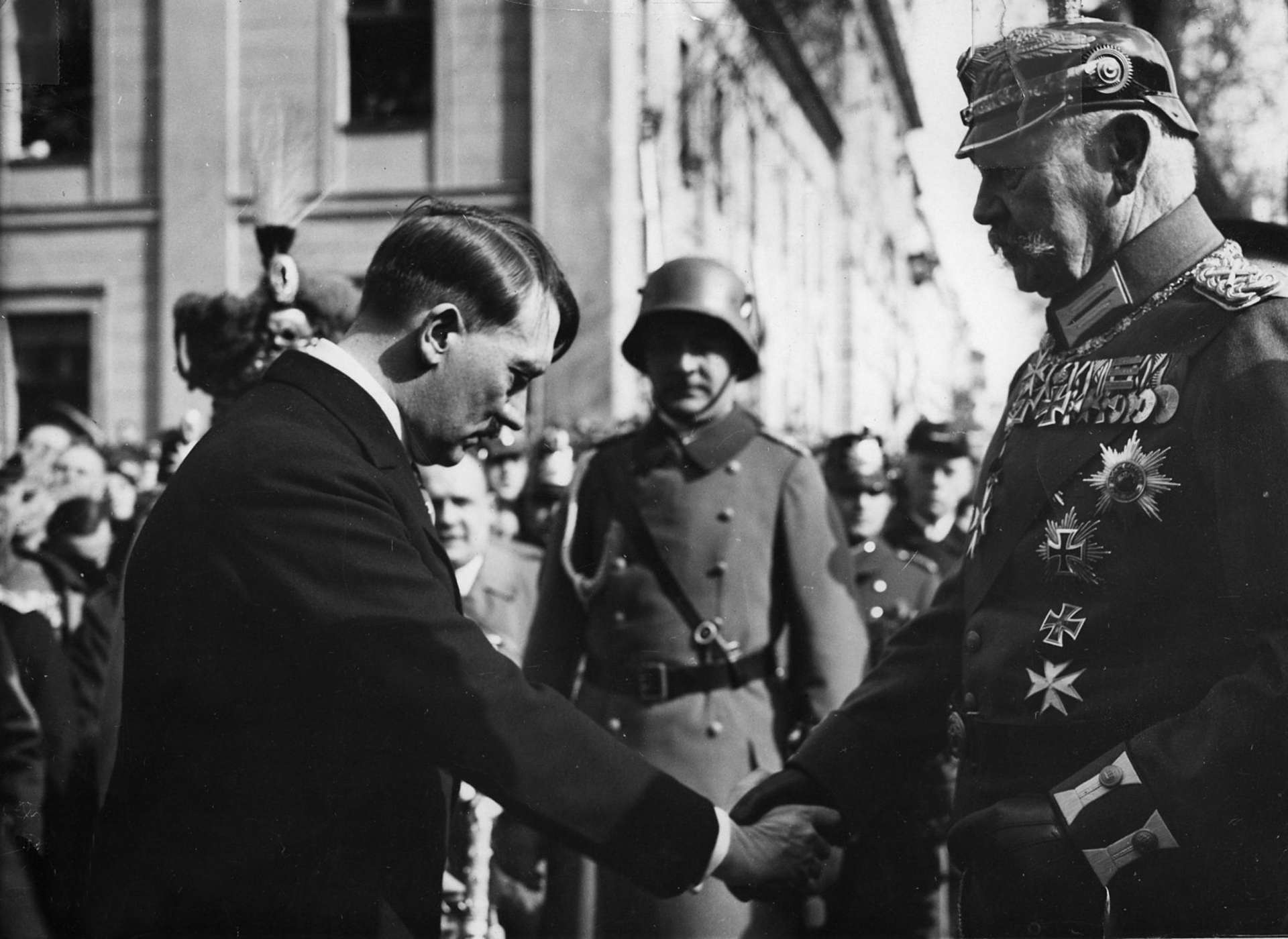 Tag von Potsdam, Adolf Hitler, Paul v. Hindenburg Zentralbild Reichspräsident von Hindenburg und Reichskanzler Adolf Hitler am Tage von Potsdam (21. März 1933) [Potsdam.- Reichskanzler Adolf Hitler verneigt sich vor Reichspräsident Paul von Hindenburg (in Uniform mit Pickelhaube) und gibt ihm die Hand] Abgebildete Personen: Hitler, Adolf: Reichskanzler, Deutschland Hindenburg, Paul von Beneckendorff und von: Reichspräsident, Generalfeldmarschall, Deutschland (GND 118551264)